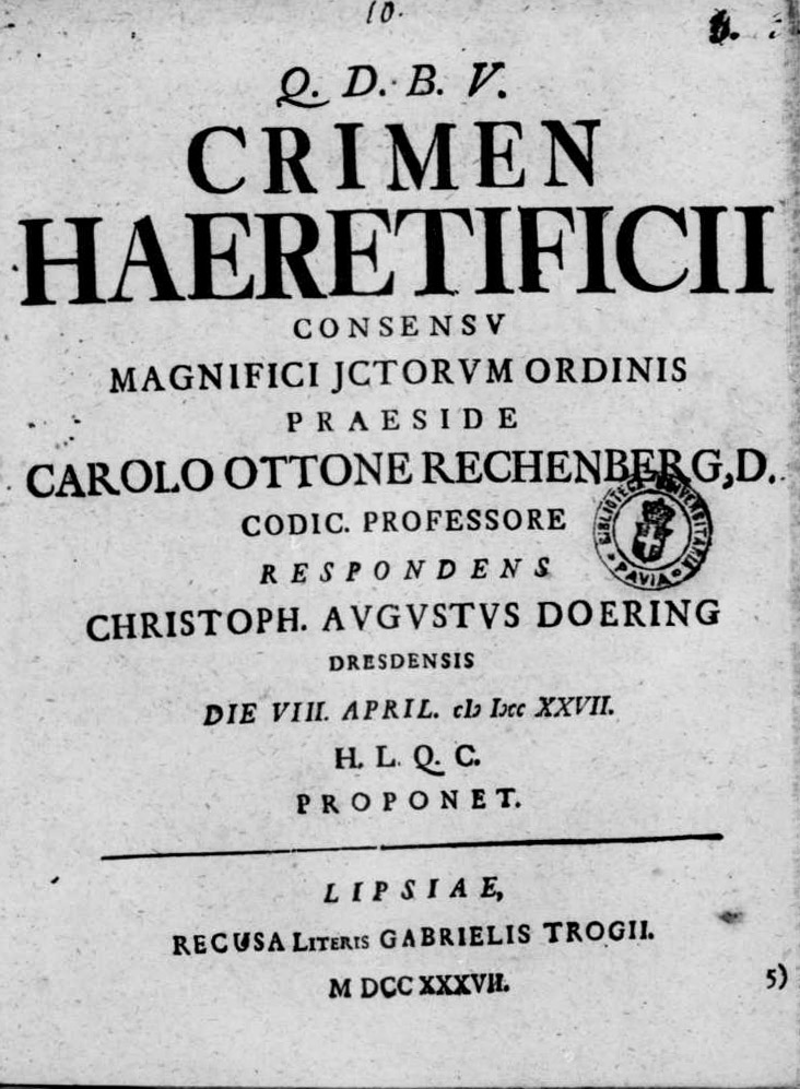 Frontespizio